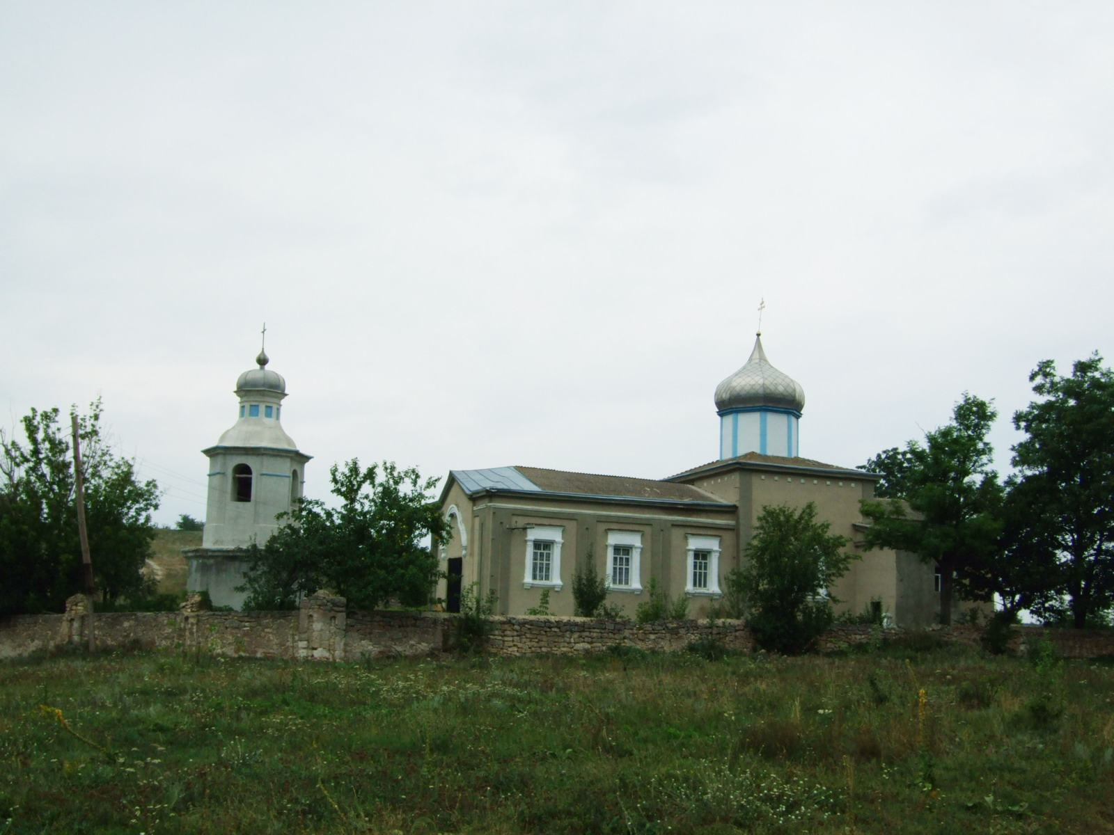 Комплекс Миколаївської церкви, Стіна, вул. Примакова, 37